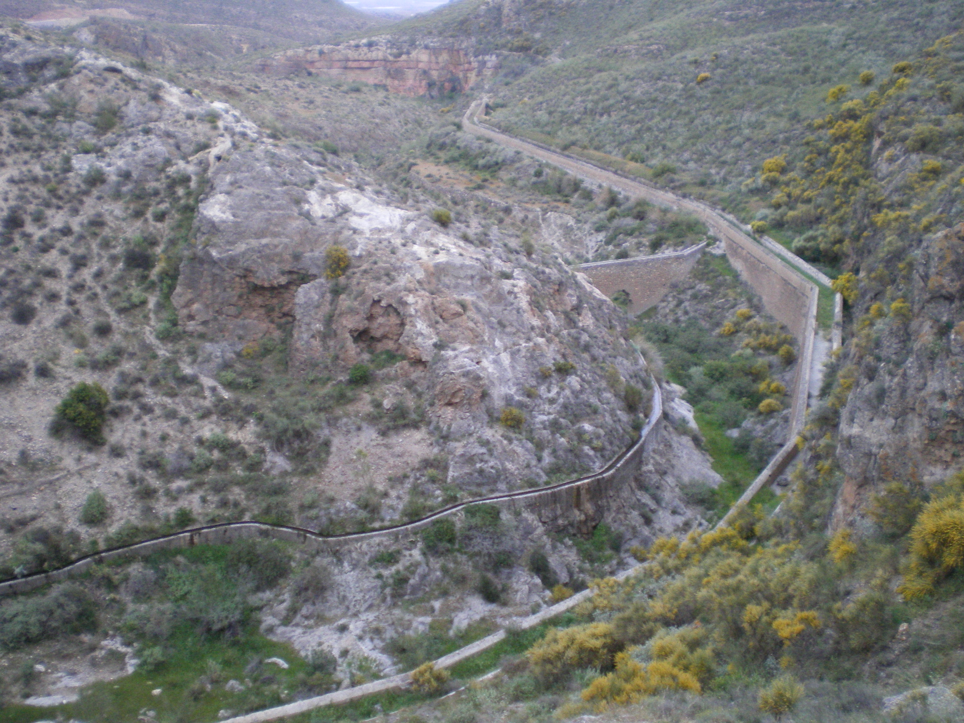 Canal desde el Embalse de Isabel II hasta el Campo de ´Níjar, Almería España, visto hacia el sur.